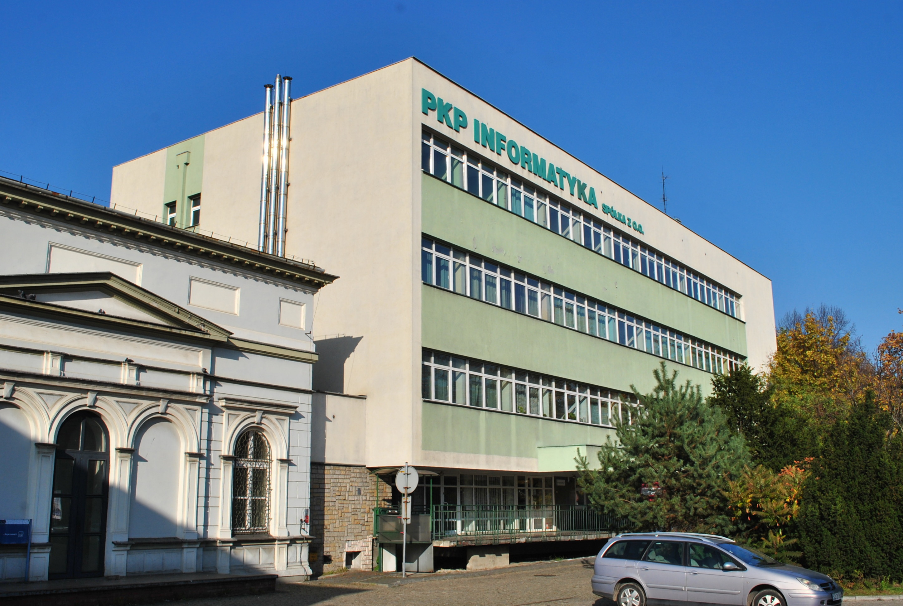 Stacja Sosnowiec Główny - budynek PKP Informatyki